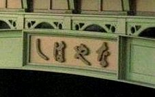 堀川に架かる納屋橋のアーチ部分。上流側から。